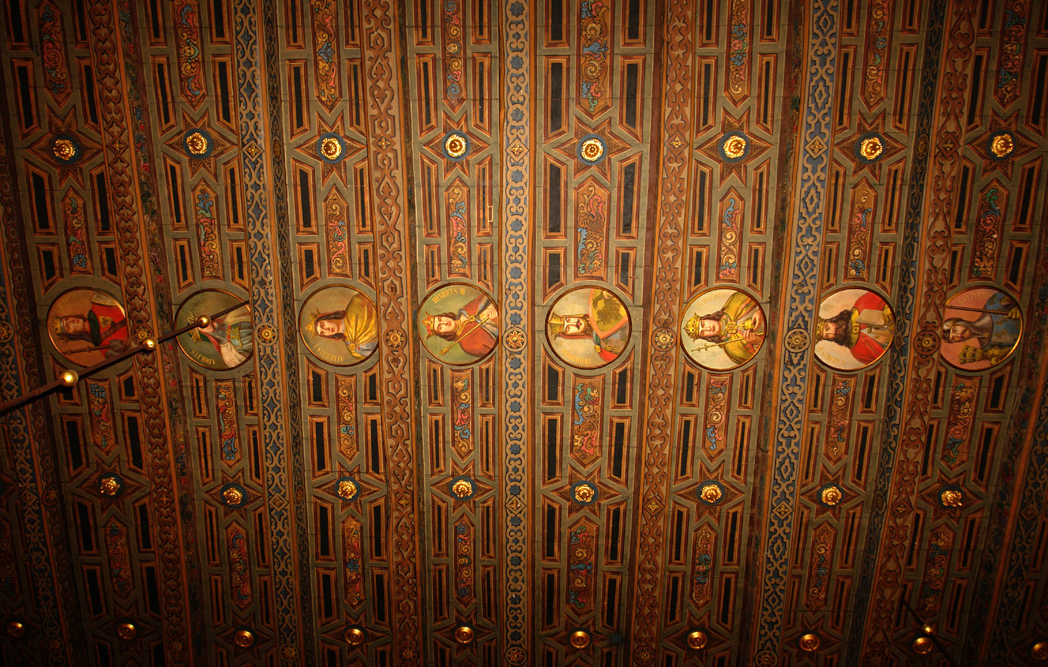 Rathaus in Bremen. Ornamental bemalte Decke aus Eichenstämmen mit 33 Kaisermedaillons in der Oberen Halle.